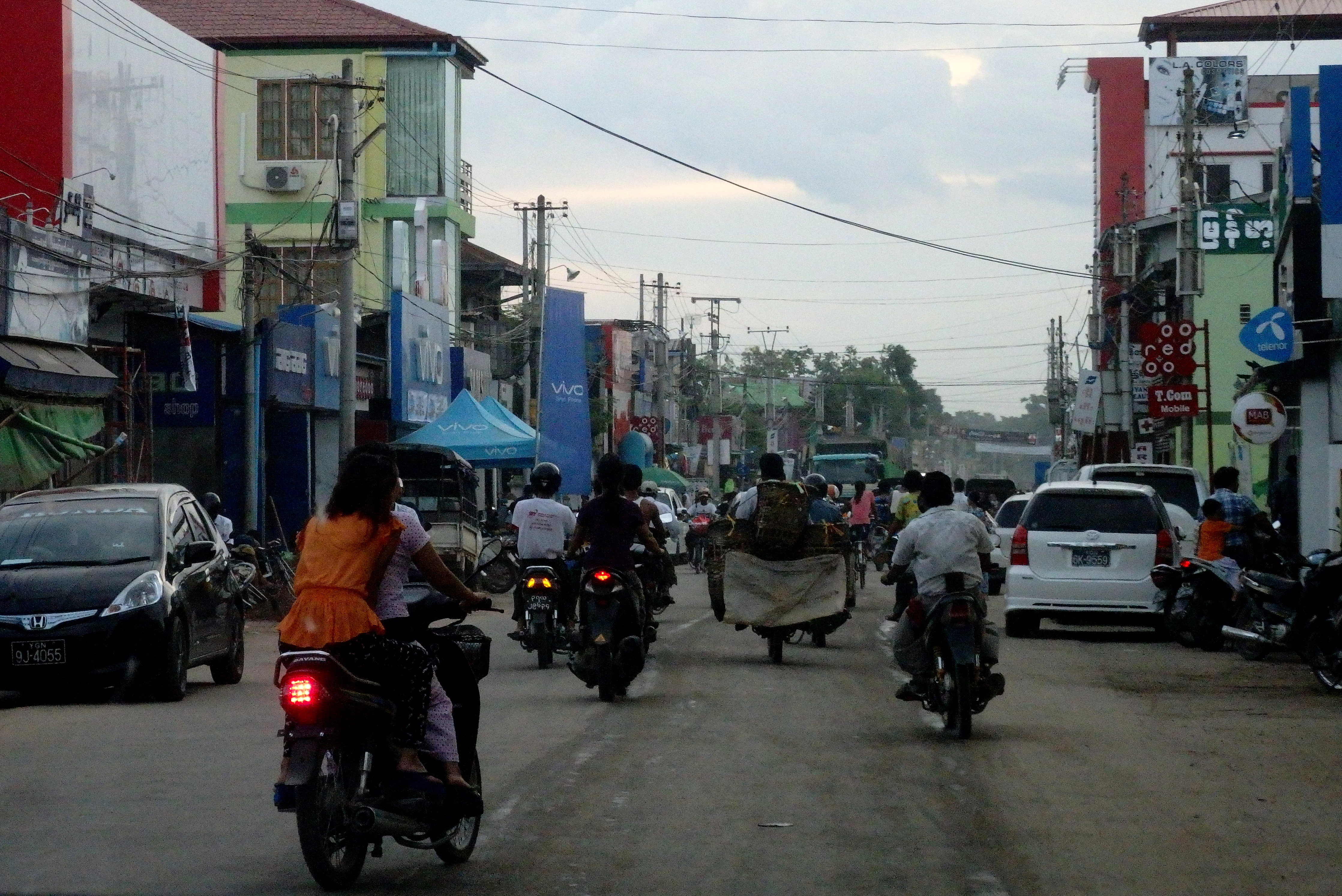 Taungoo, Myanmar (Burma)